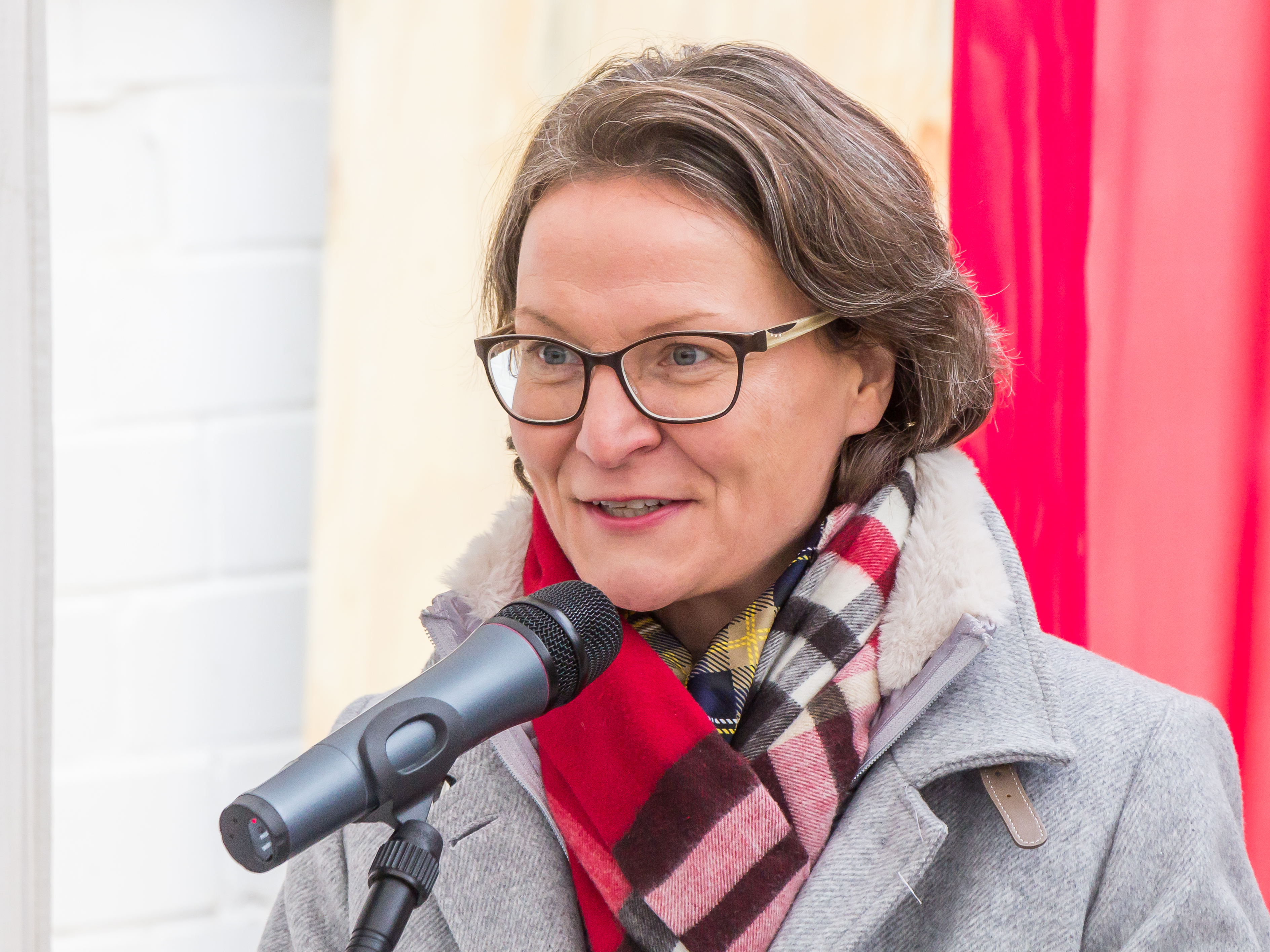 Restaurierung römische Wasserleitung aus Hürth Foto: Ansprache durch Ina Scharrenbach, Ministerin für Heimat, Kommunales, Bau und Gleichstellung des Landes Nordrhein-Westfalen